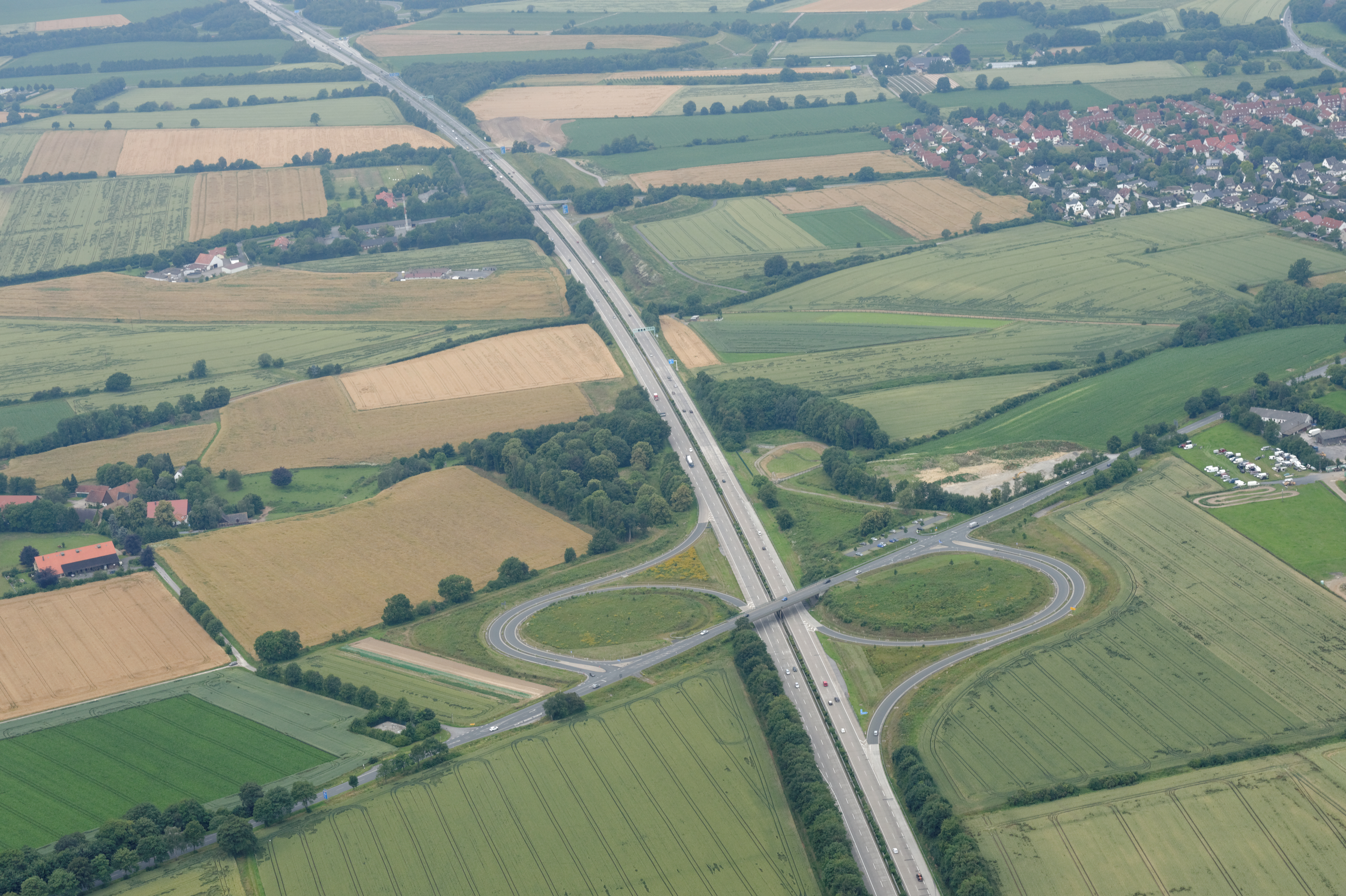 Fotoflug Sauerland-Nord. Südliches Werl: Anschlussstelle Werl-Süd der Bundesautobahn 44, Bundesstraße 516, Blickrichtung West. The making of this document was supported by the Community-Budget of Wikimedia Germany.